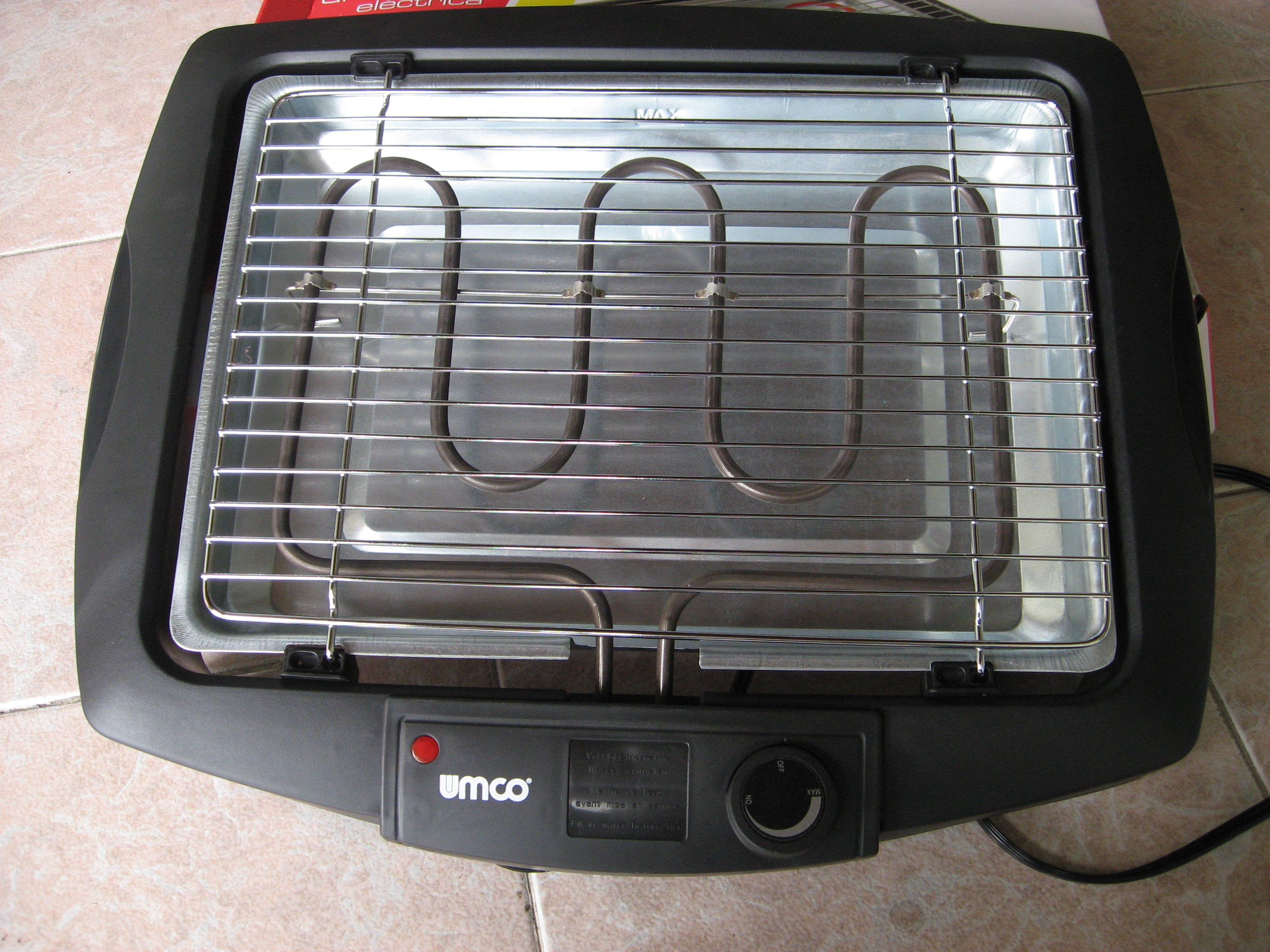 Umco-Elektrogrill